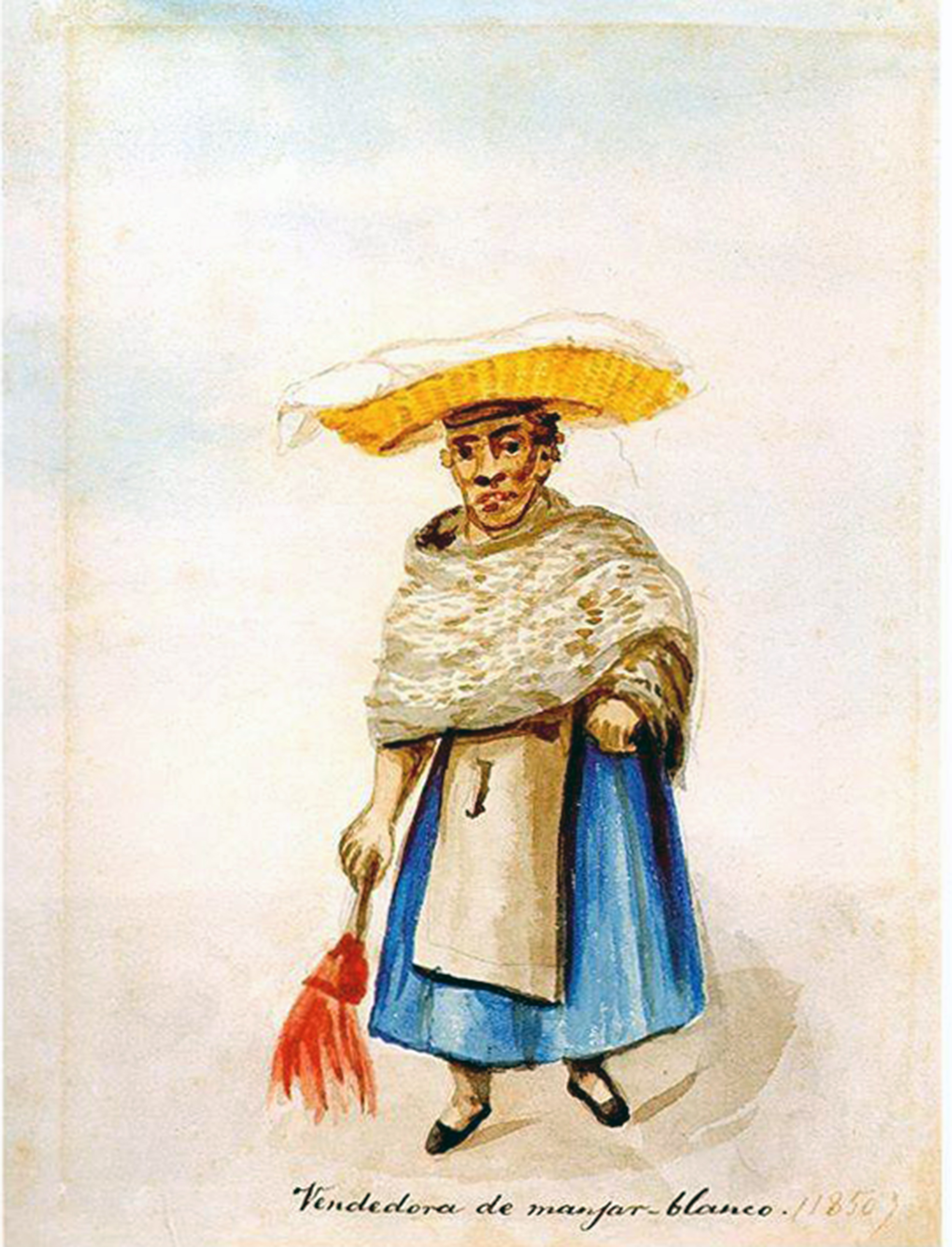 Acuarela de (Lima, 1807 - Lima, 1879)